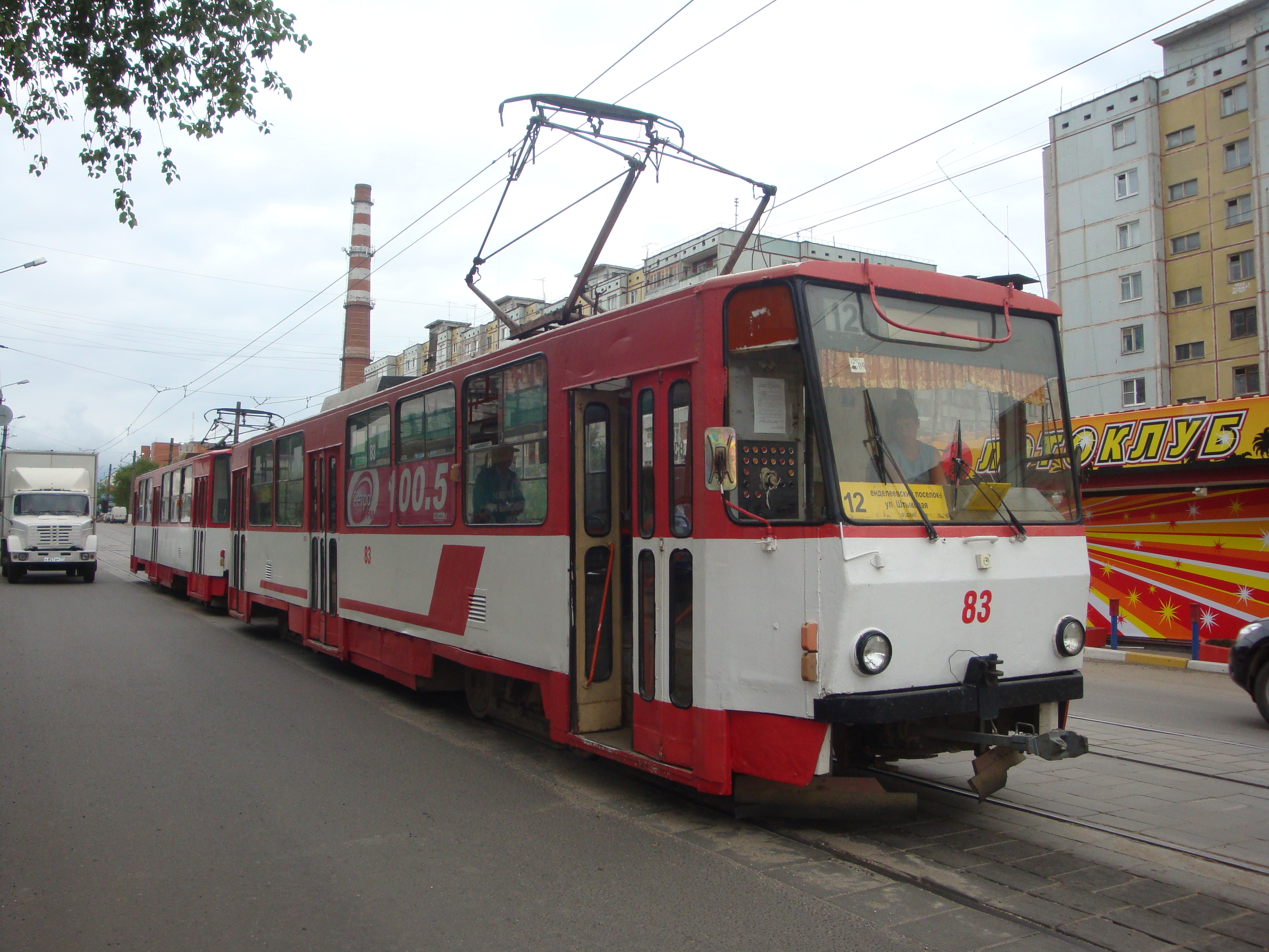 СМЕ 83-84.